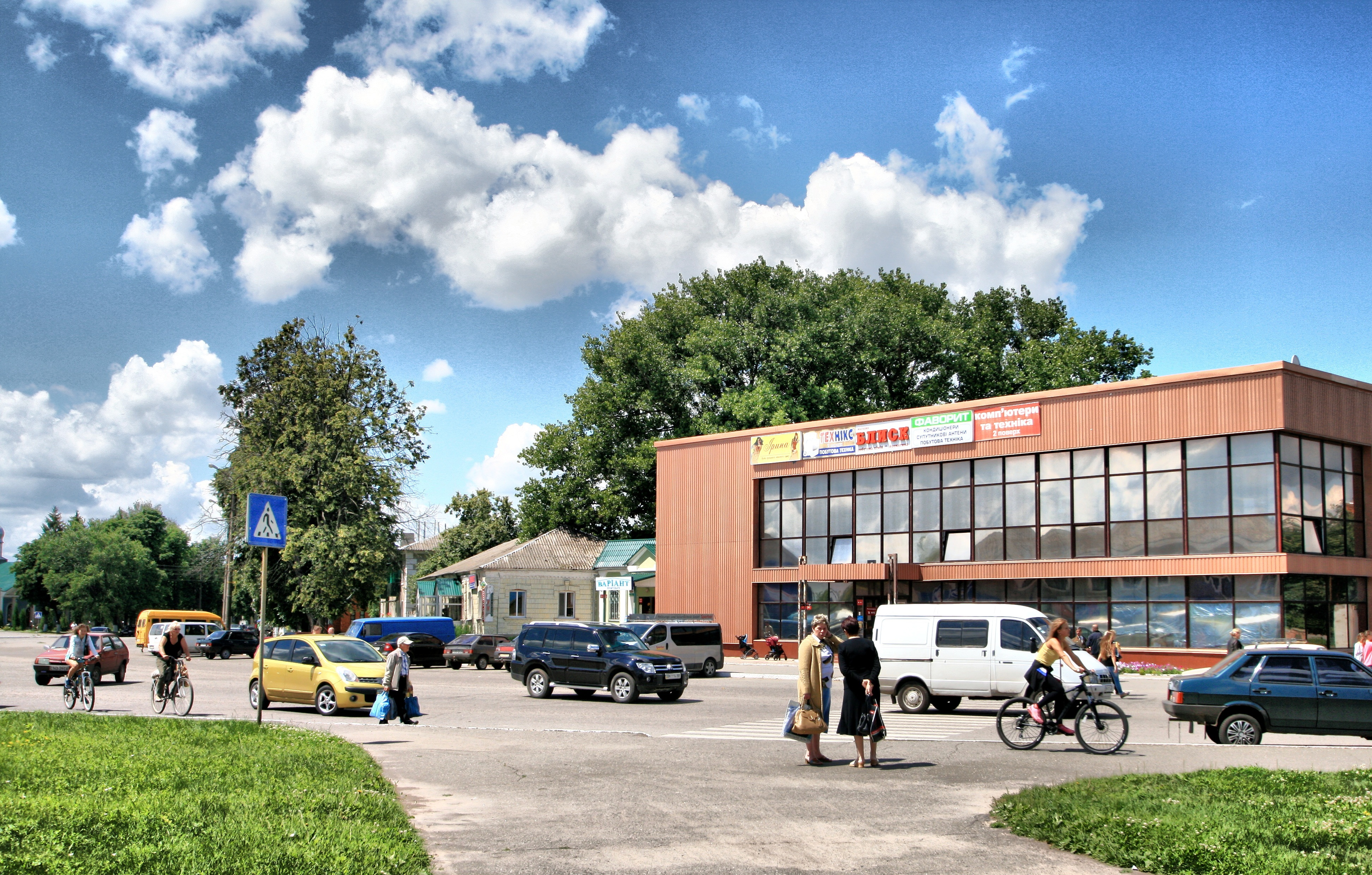 Буринь, центр города